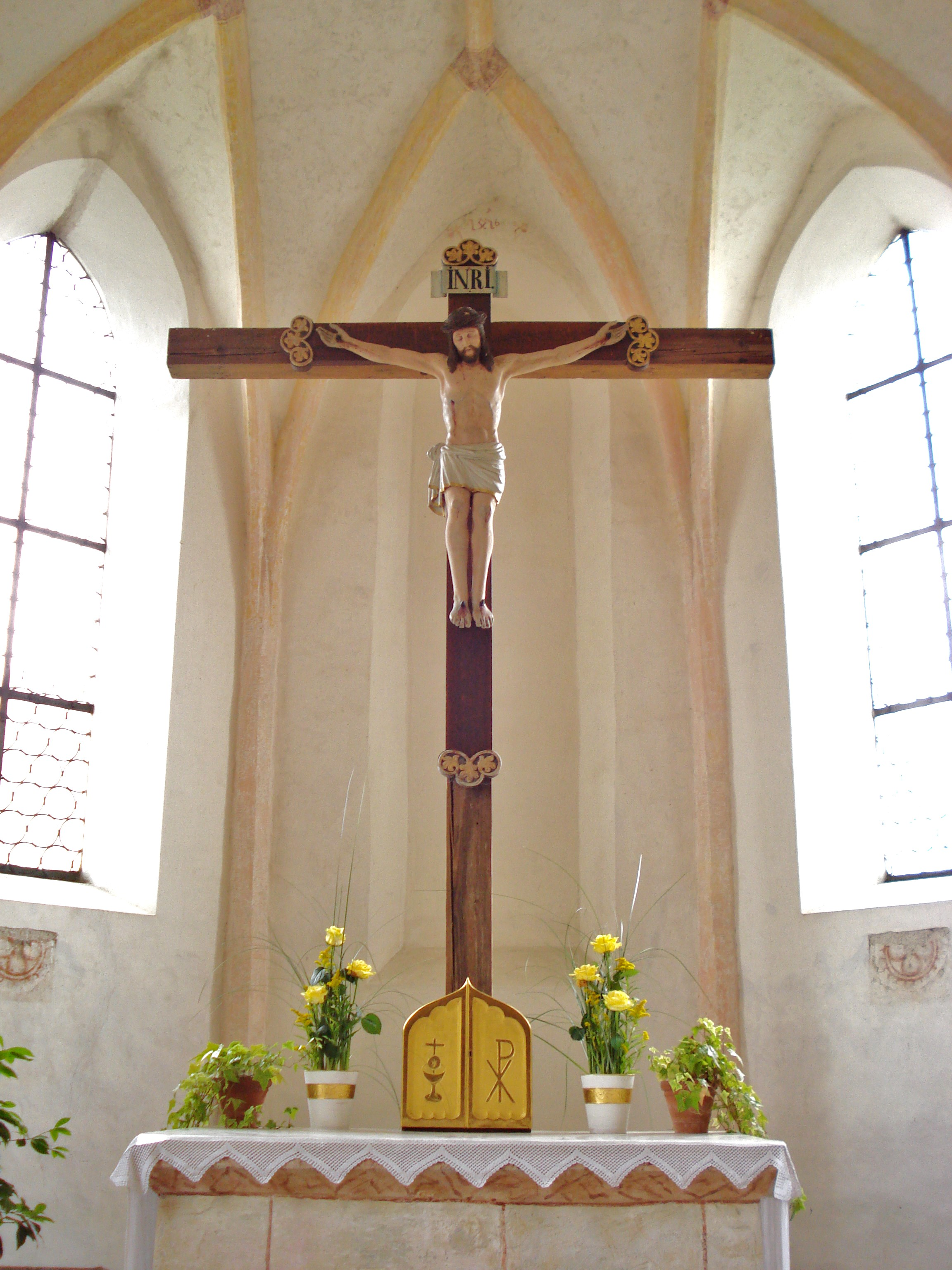 Kath. Filialkirche Westerbuchberg, Chorraum mit Altarkreuz